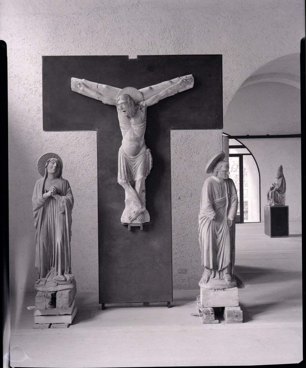 Verona. Museo civico di Castelvecchio. Galleria delle Sculture. Sala IV con il gruppo scultoreo Maestro di Santa Anastasia,"Crocifissione di Tomba", sec. XIV. Servizio fotografico : Verona, 1961 / Paolo Monti. - Buste: 4, Fototipi: 4 : Negativo b/n, gelatina bromuro d'argento/ pellicola ; 10x12. - ((Serie costituita da 4 buste sciolte di negativi identificati con i nn.: 10284, 10285, 10286, 10287 (vedi serie 10272-10291Gpbn). - I fotogrammi sono identificati anche con un'altra numerazione, manoscritta sulla busta in basso a destra (es. 19R, 73). - Occasione: Documentazione del restauro e dell'allestimento ad opera dell'architetto Carlo Scarpa. - : Monti/ 2/ 6 giugno 1964 - 31 marzo 1966/ 8194-12420 (1964/12/13), presso Archivio Paolo Monti. - Fonte: Agenda di Paolo Monti